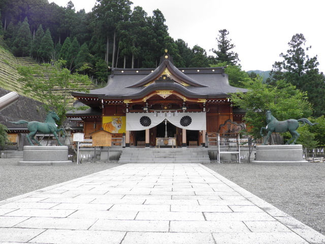 丹生川上神社上社